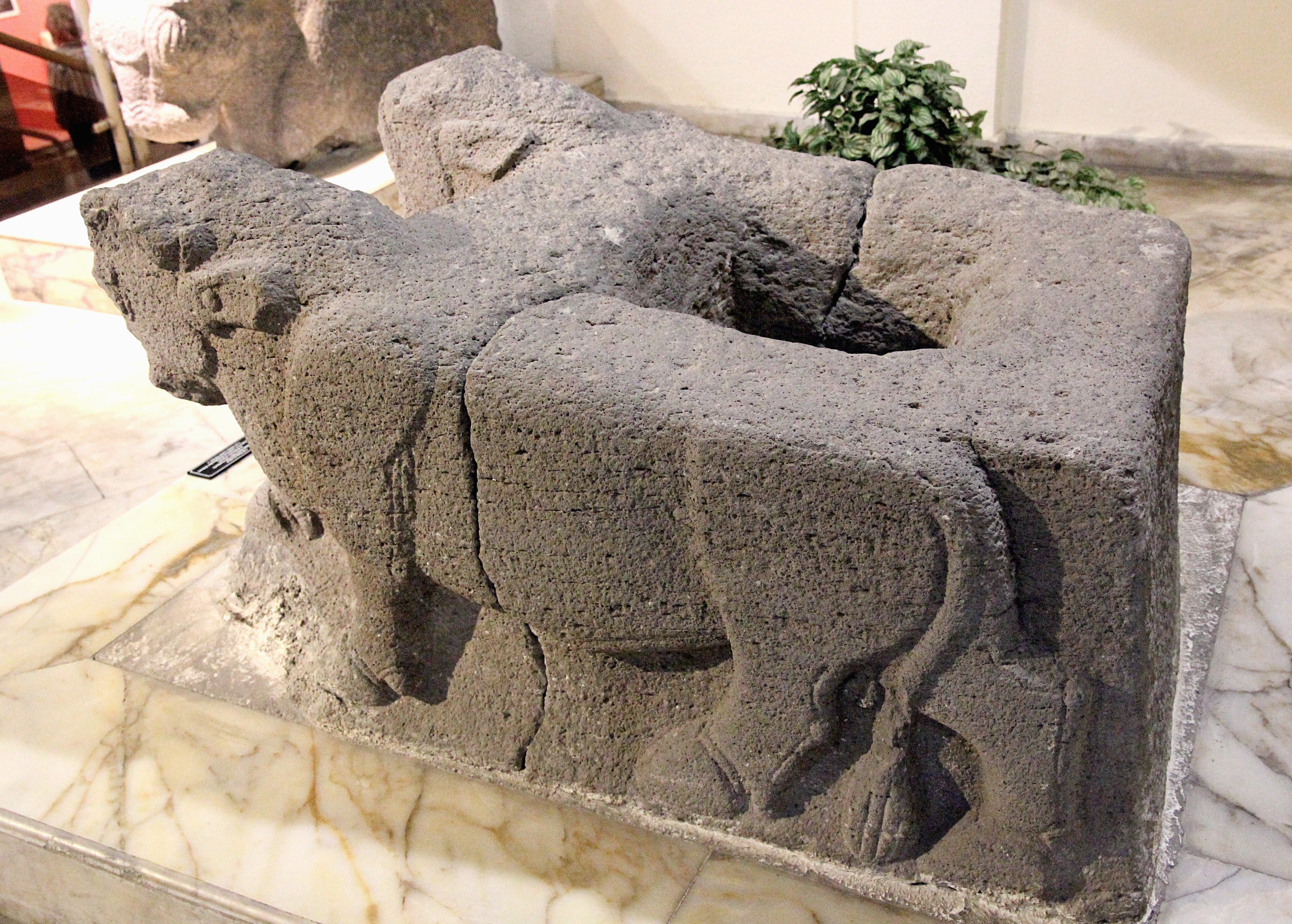 Archäologisches Museum Şanlıurfa, Südosttürkei, Stierbasis aus Kabahaydar